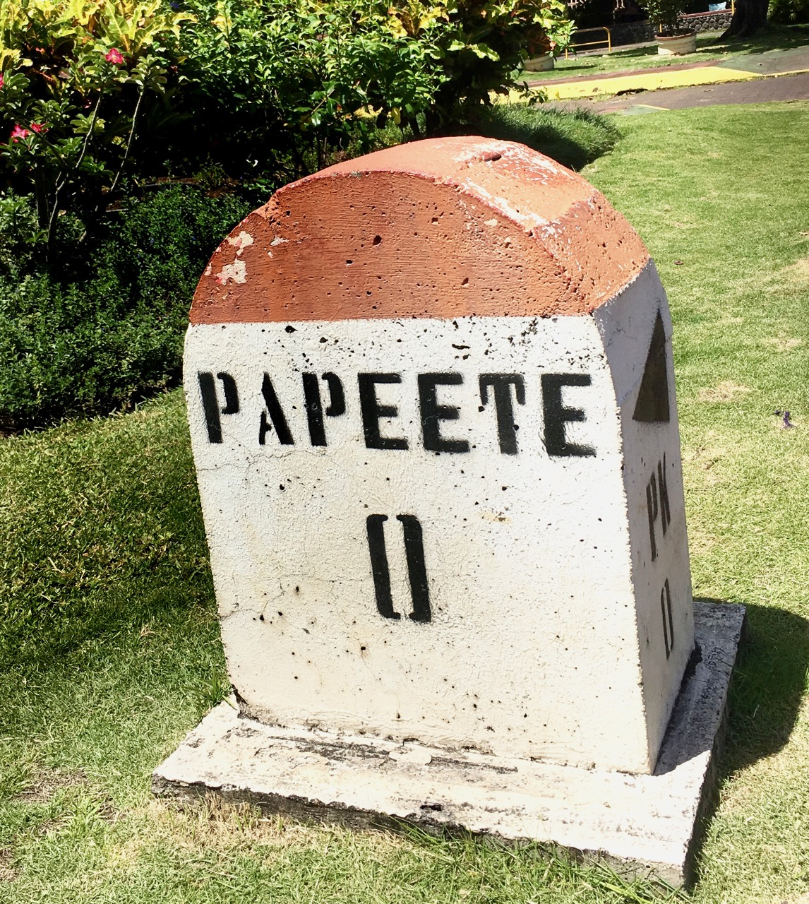 PK 0 Papeete